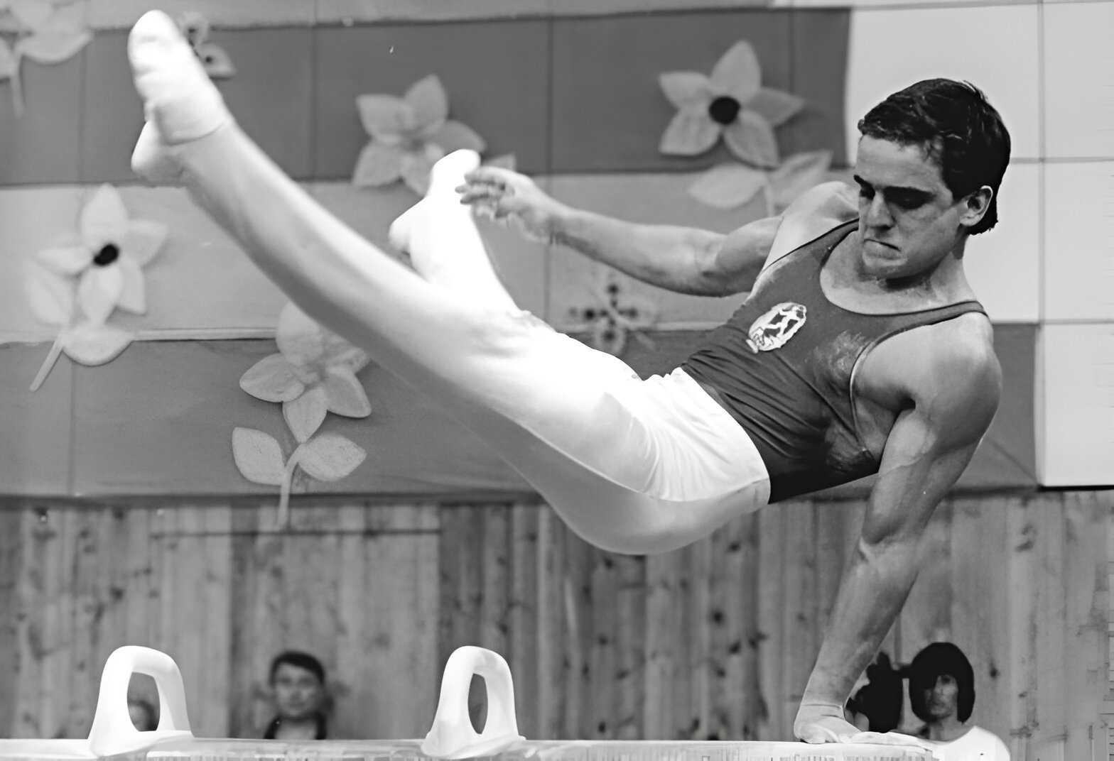 Sven Tippelt ADN-ZB Thieme 18.8.89 Karl-Marx-Stadt: Turnen-Bei den DDR-Meisterschaften im Turnen belegte Sven Tippelt (SC DHFK Leipzig) nach der Pflicht mit 36,70,3 Punkten den zweiten Platz.